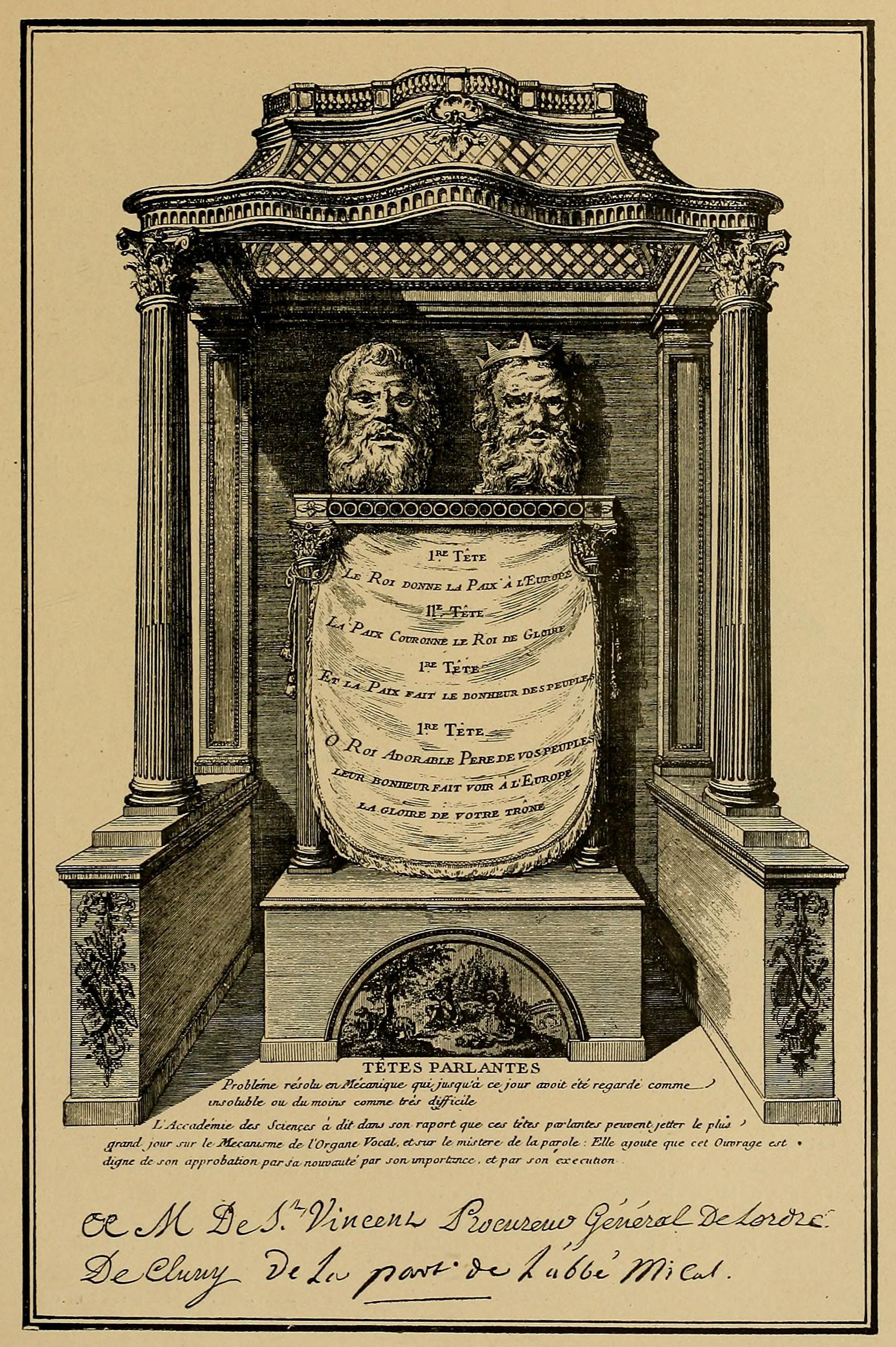 Illustration from Histoire des jouets